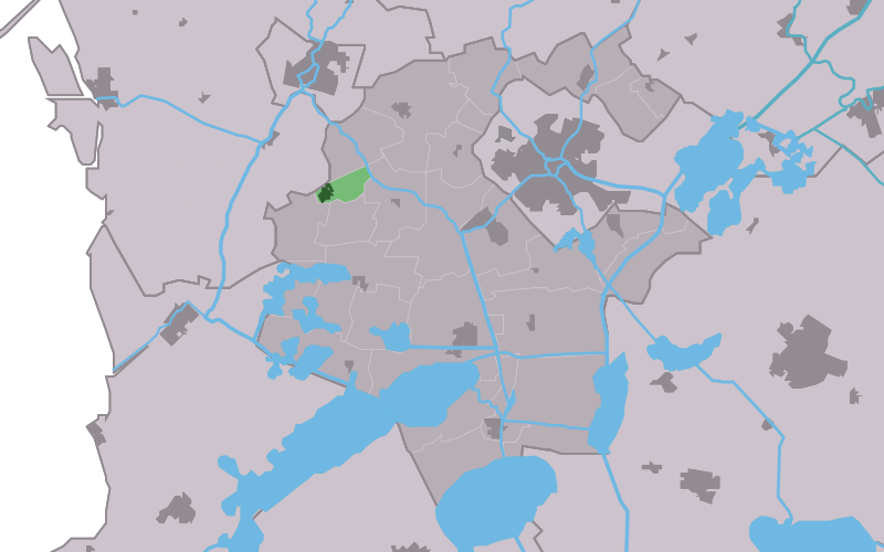 Kaartsje fan himrik fan Blauhûs